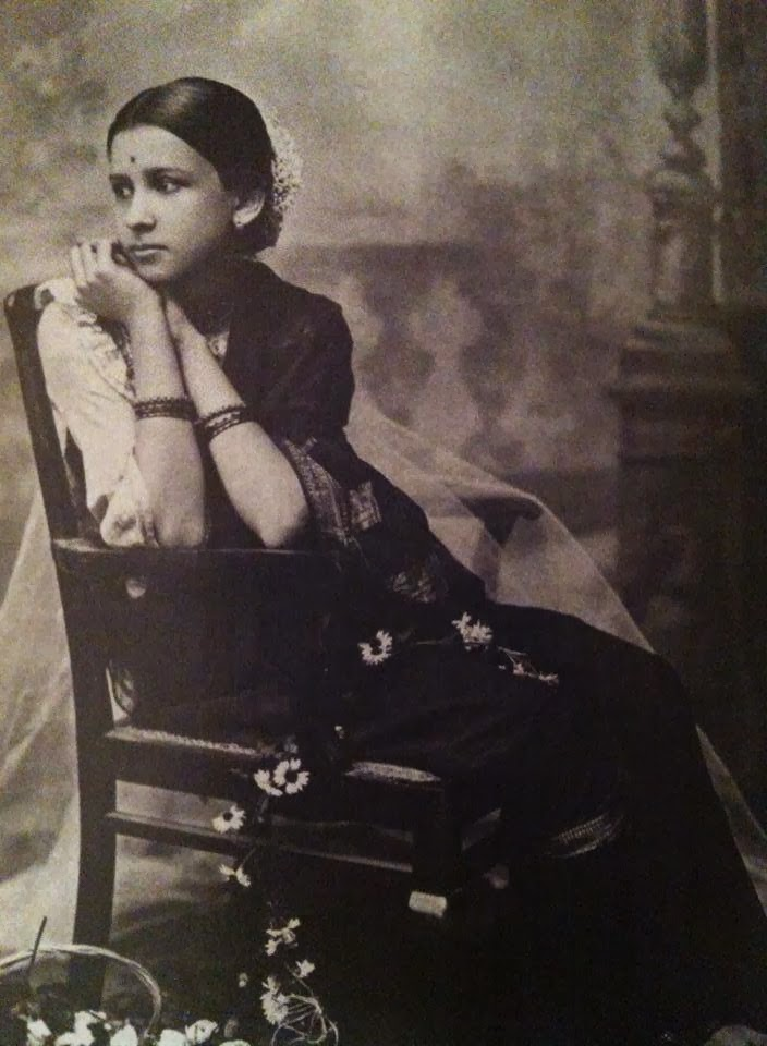 Maharani Indira Bai Sahib Holkar, Second Wife of Maharaja of Indore Tukoji Rao Holkar III